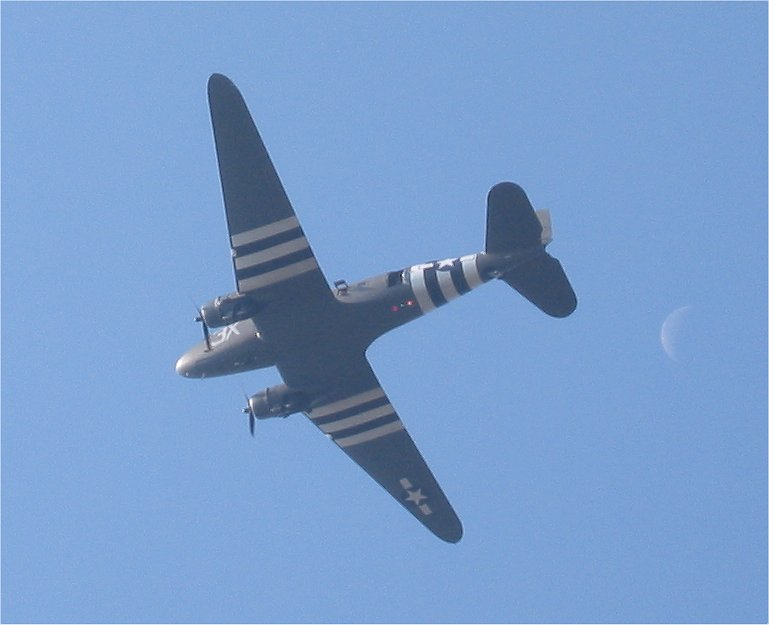 Dakota parachutisten dropping